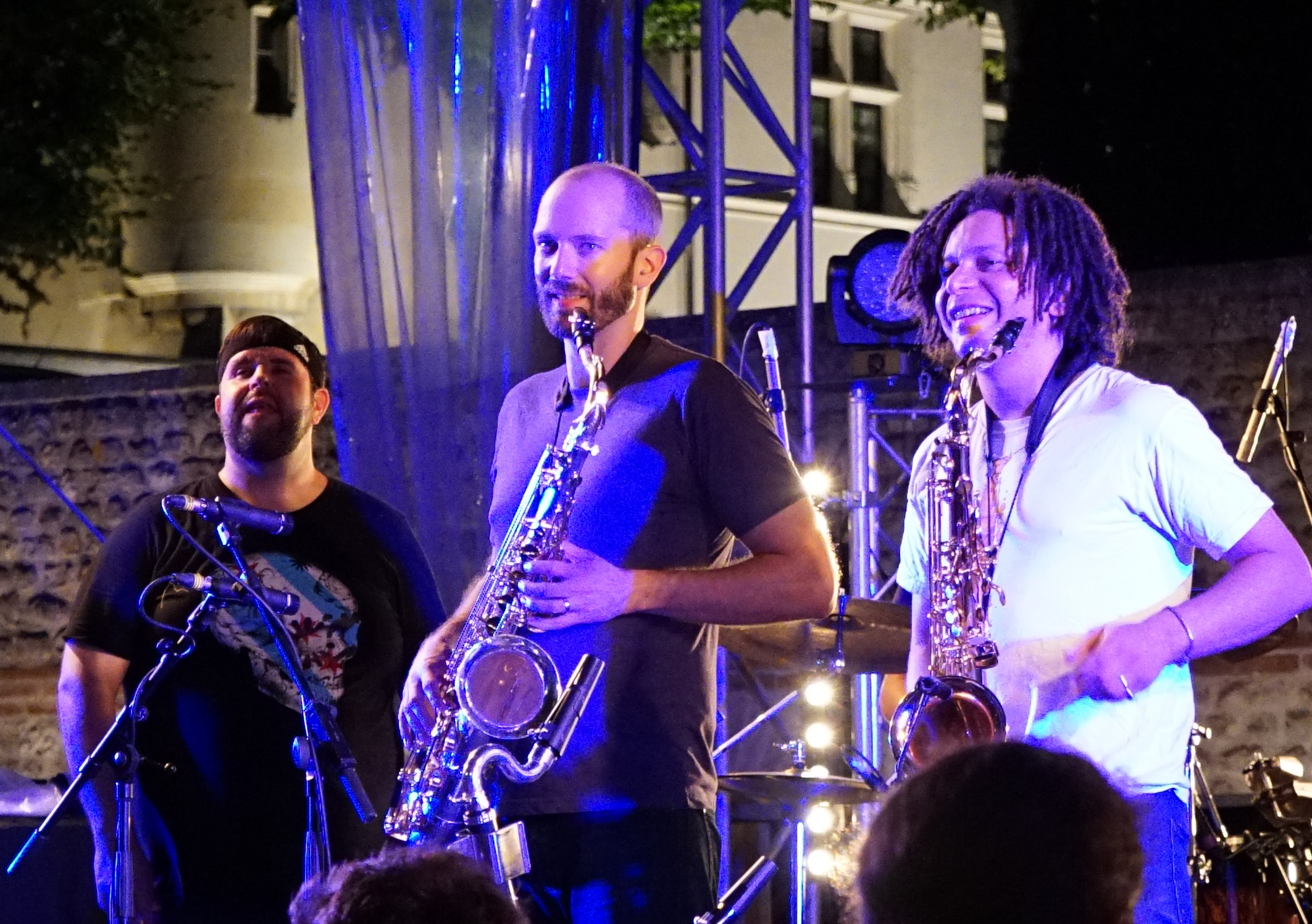 les Youngblood Brass Band à Reims.